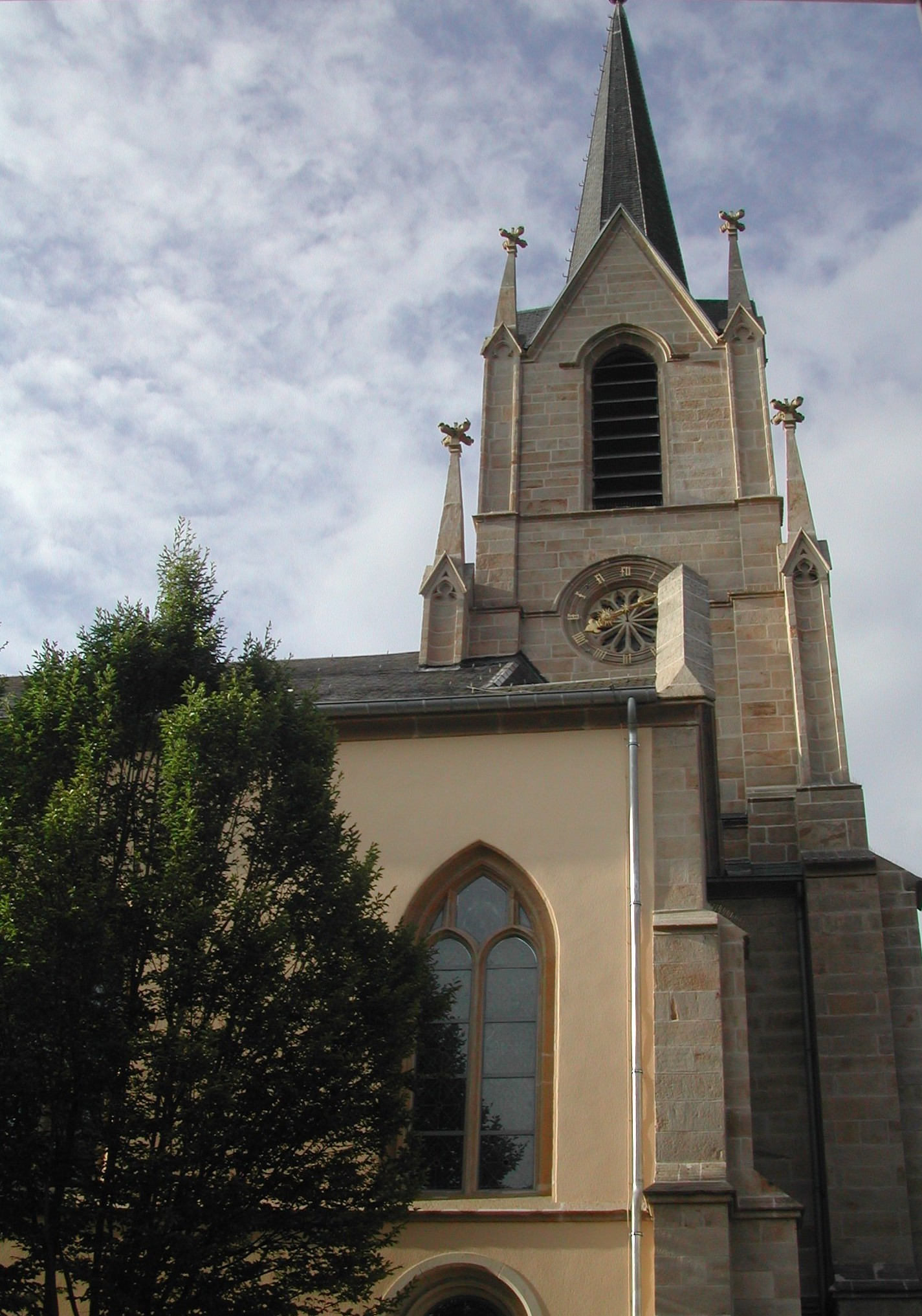 D´Kierch vu Steesel.Steesel +Kategorie:Gemeng Steesel